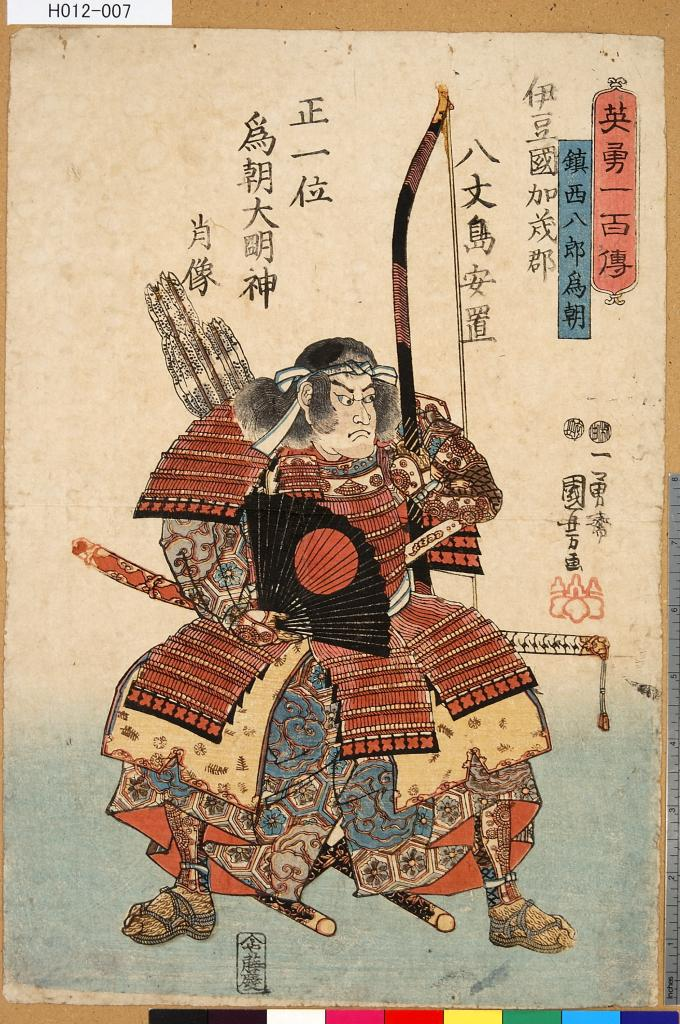 伊豆国加茂郡八丈島安置 正一位為朝大明神肖像